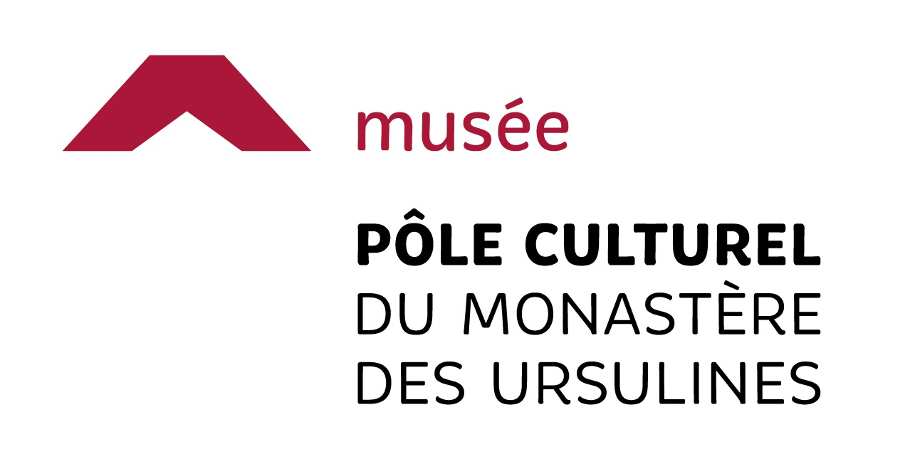 Ce logo est une déclinaison du logo du Pôle culturel du Monastère des Ursulines